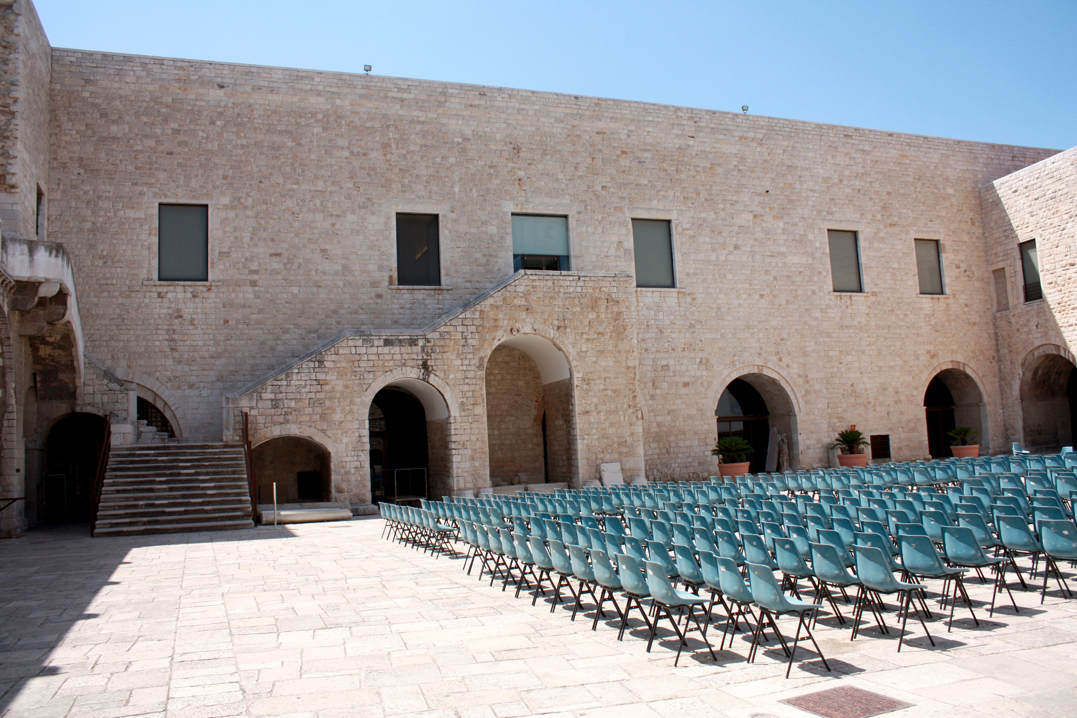 Castello di Barletta - Prospetto ovest interno